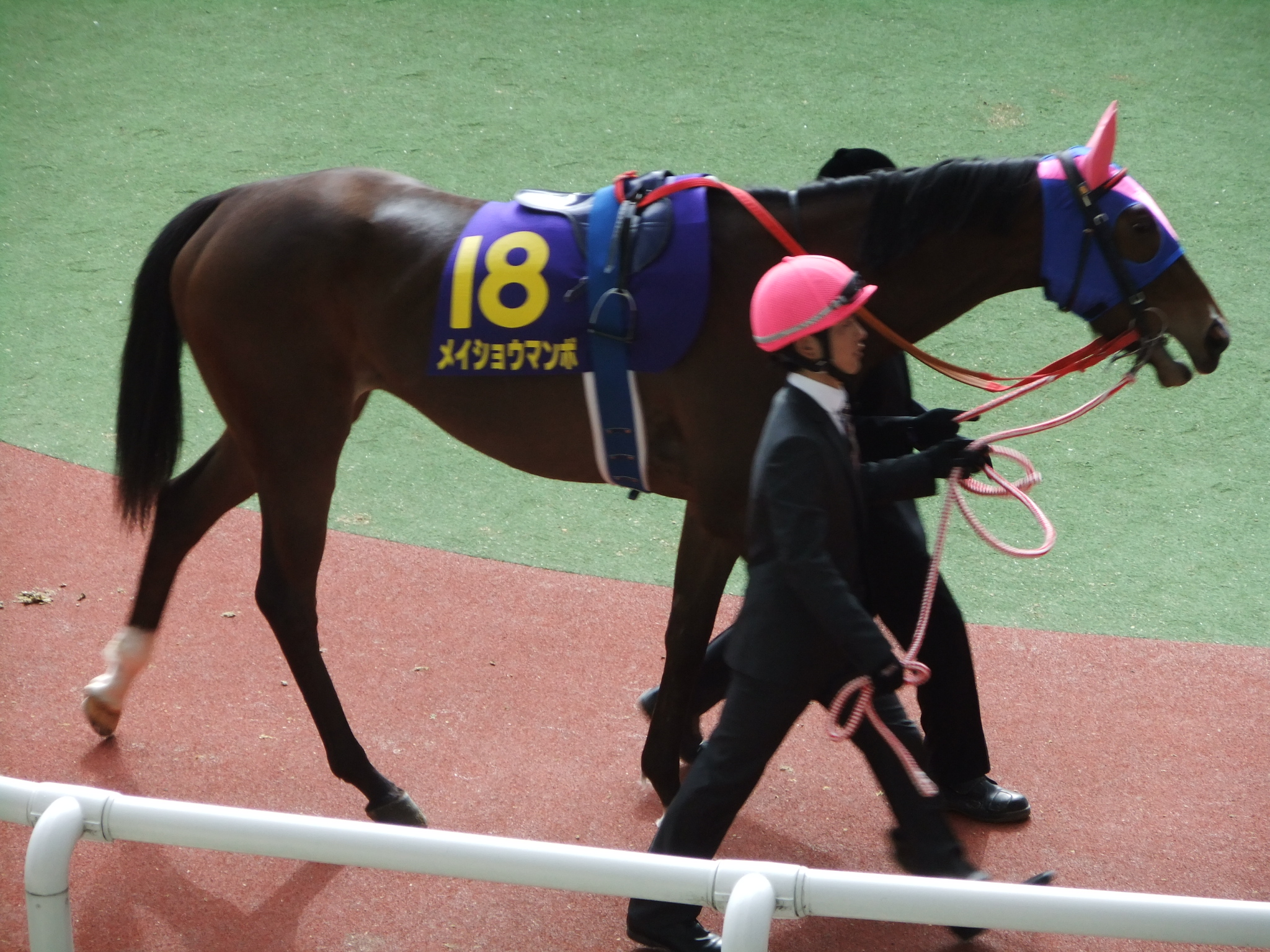 メイショウマンボ 2013年4月7日 阪神競馬場